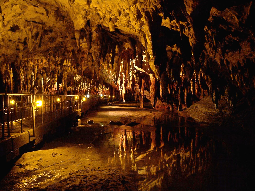 Σπήλαιο πηγών Αγγίτη«Σπήλαιο Αγγίτη»